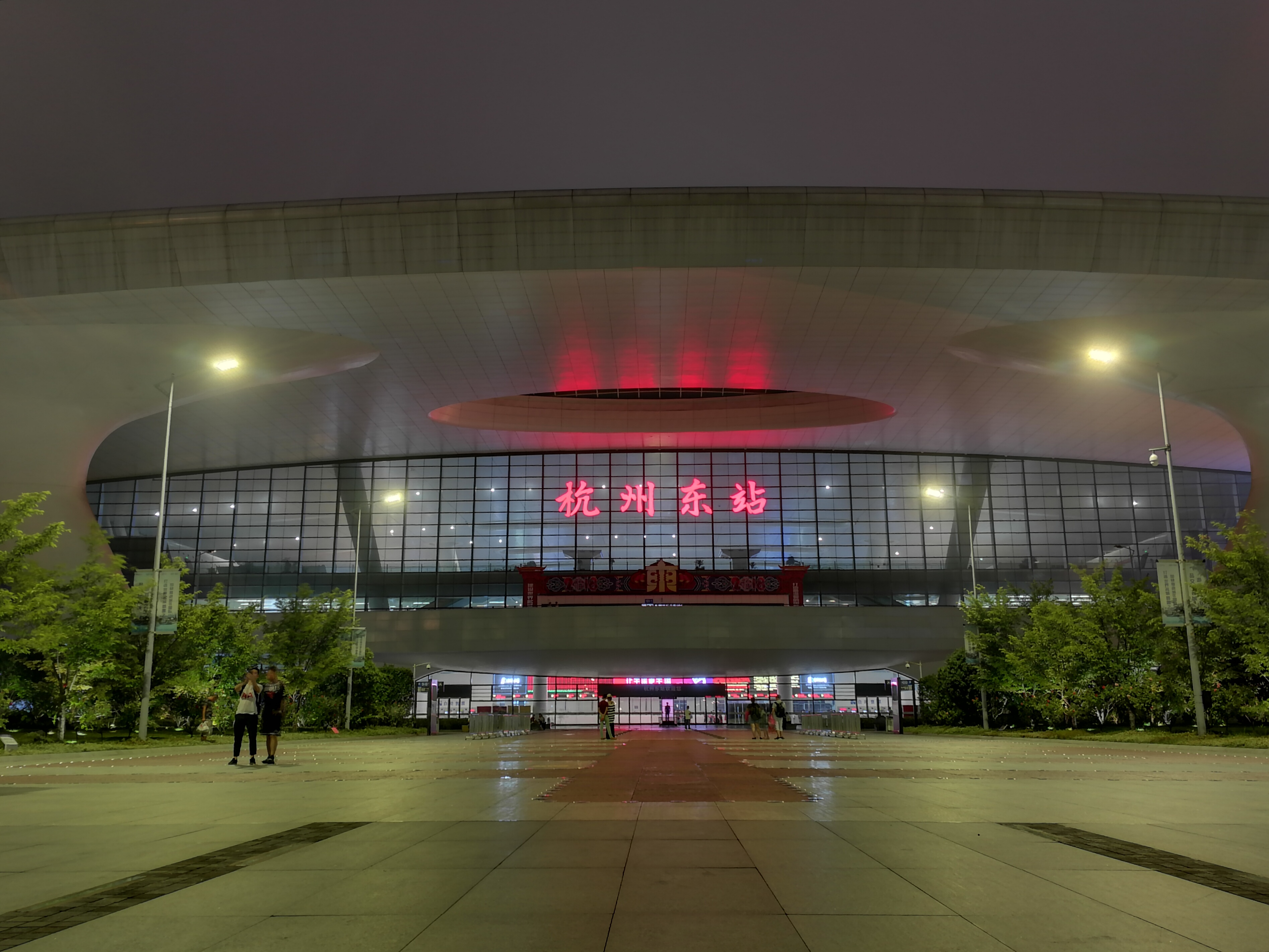 于杭州市杭州东站东广场望